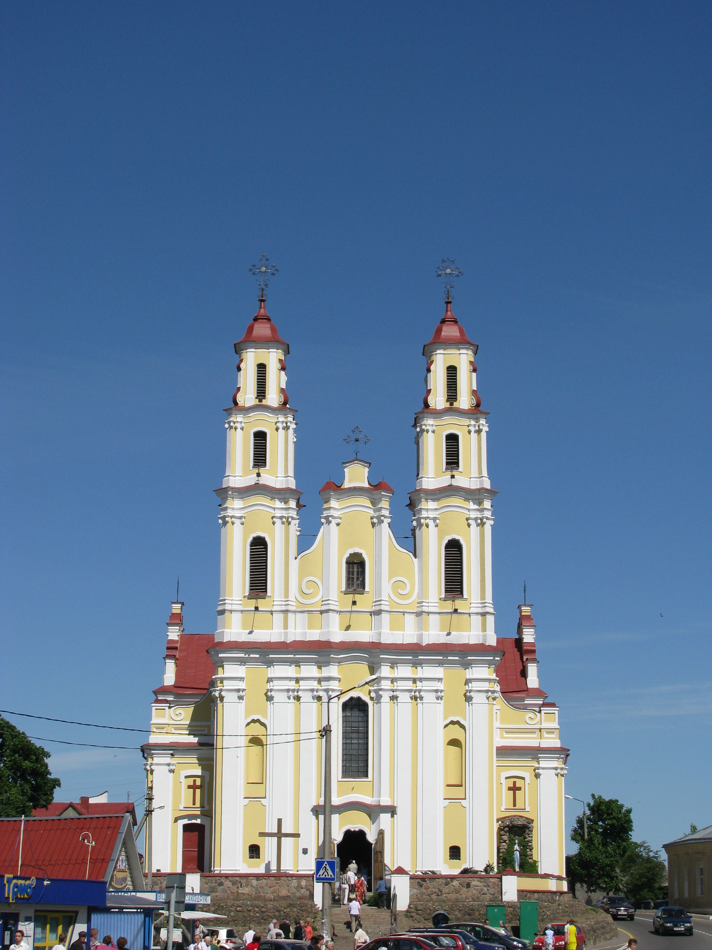 Беларуская (тарашкевіца): Троіцкі касьцёл. г. Глыбокае